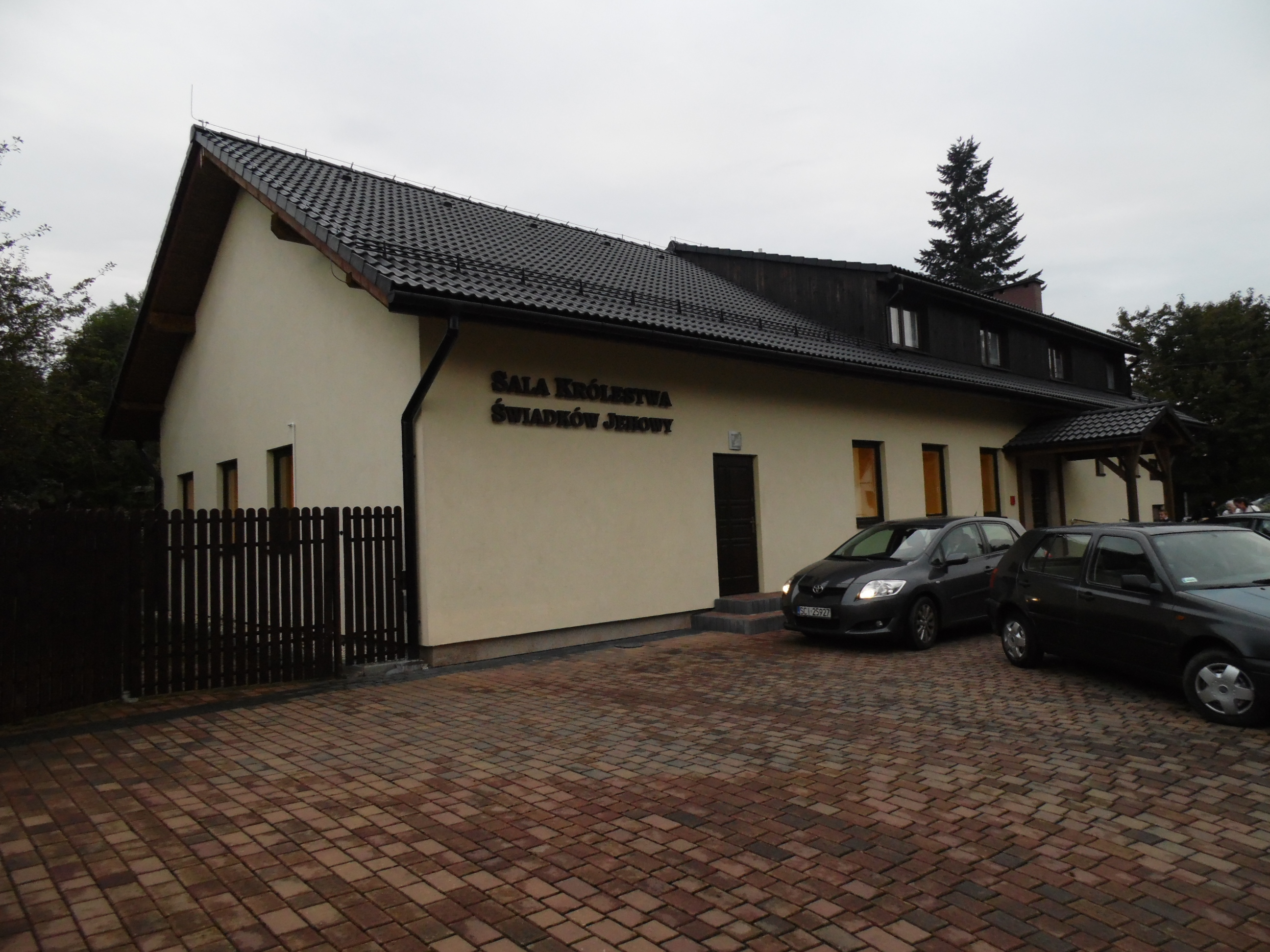 SALA KRÓLESTWA ŚWIADKÓW JEHOWY.